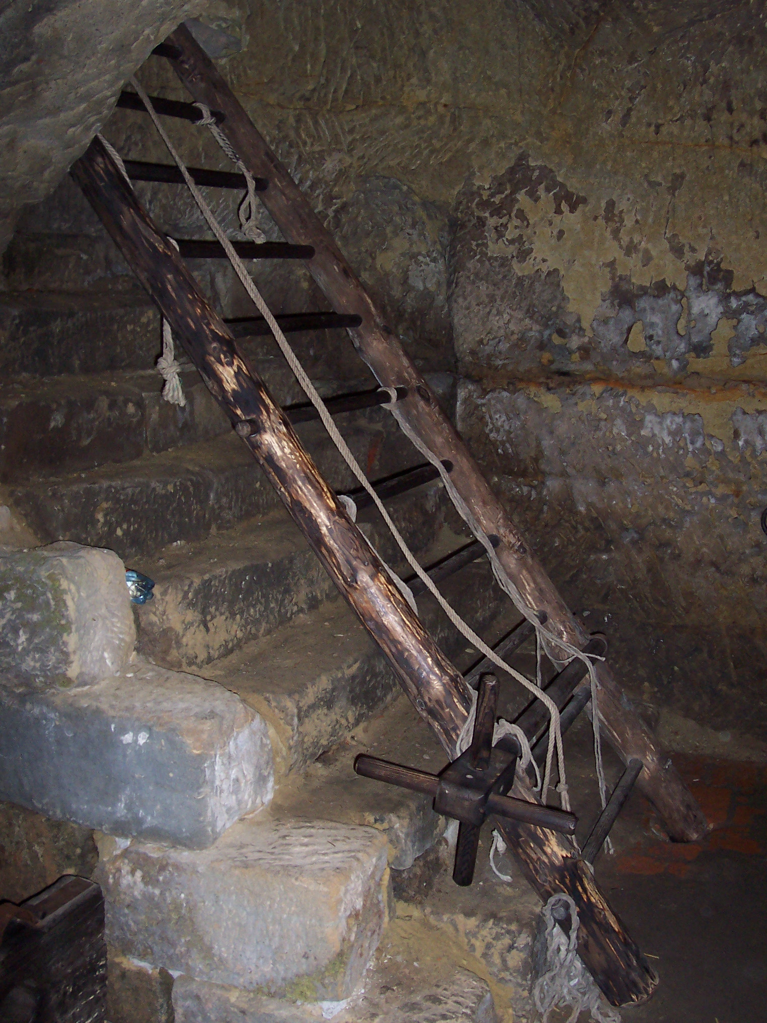 Hrad Kost - mučírna (žebřík) / Castle Kost - torture room (ladder)